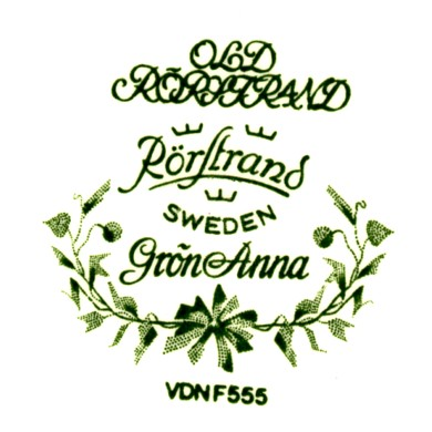 "Gröna Anna" stämpel